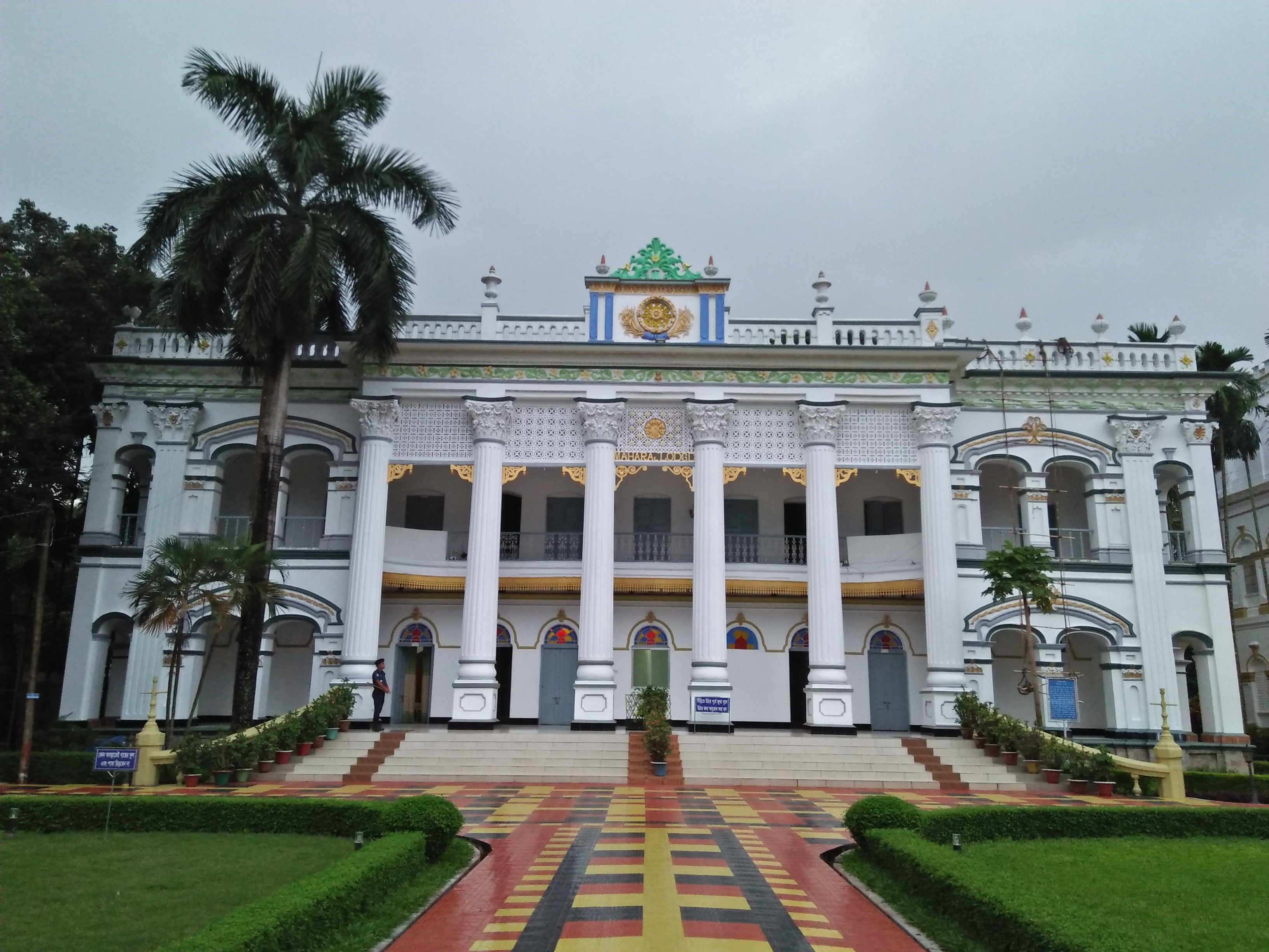 মহেরা জমিদার বাড়ি